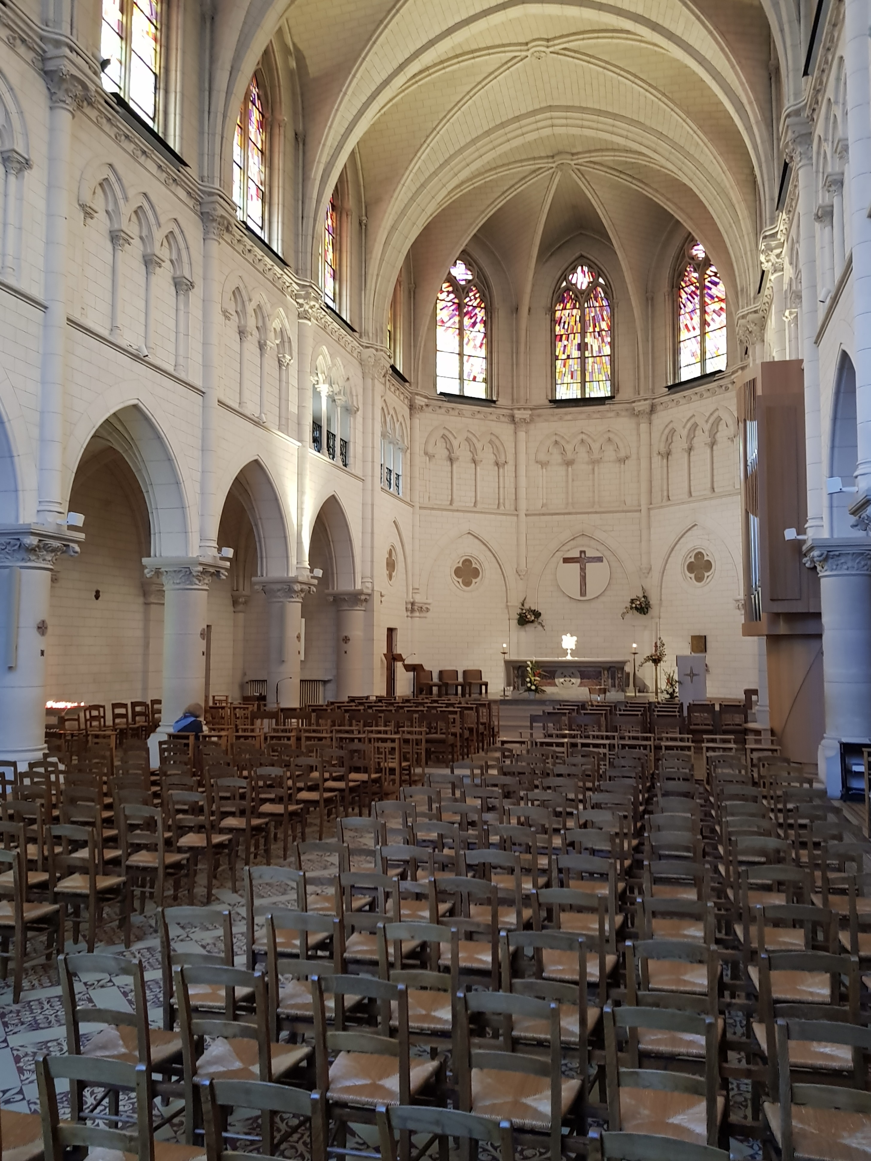 Vue intérieure de la chapelle Notre-Dame du Saint-Sacrement, 20 rue Cortambert, Paris 16e.